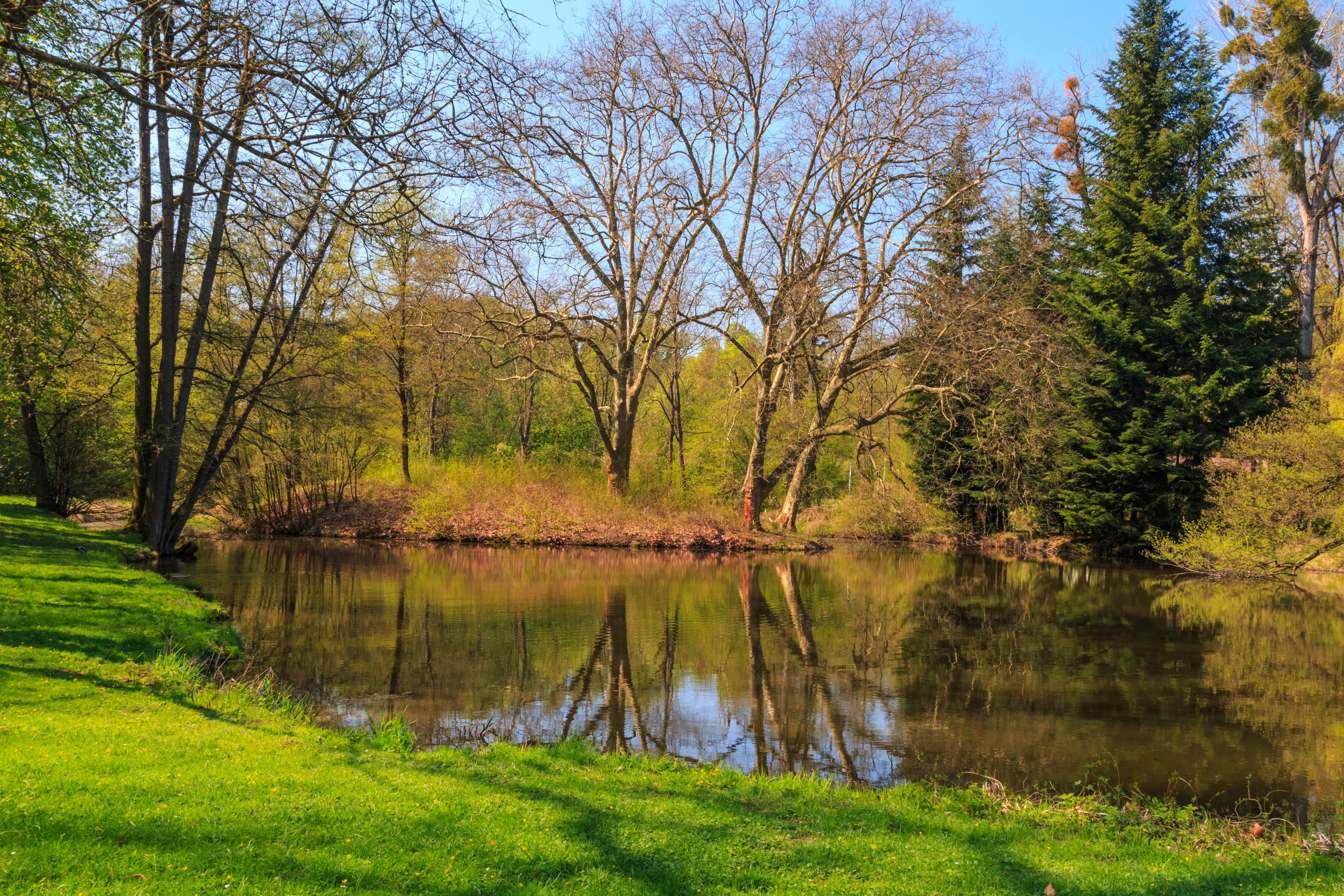 Rybník Zrcadlo v zámeckém parku Choltice Project: Vodstvo.